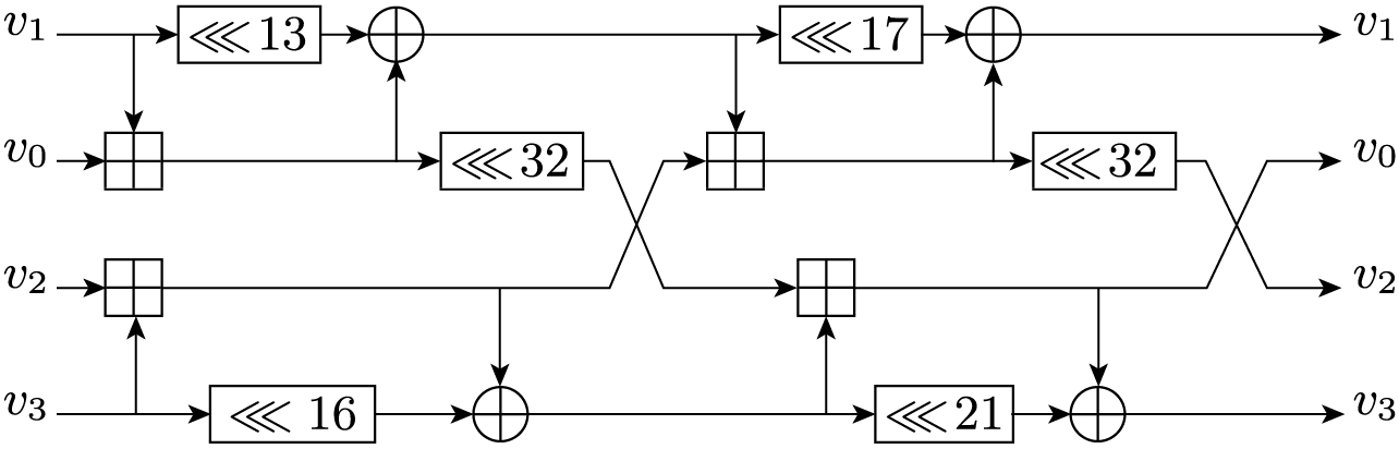 מבנה ARX של פונקציית הגיבוב SipHash